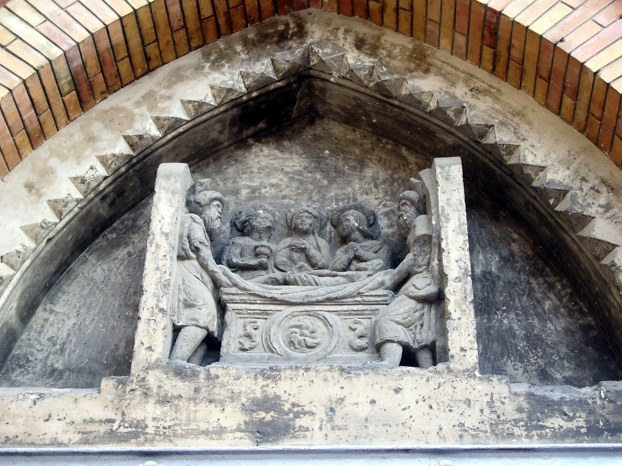 Relieve_convento_del_Santo_Sepulcro (Zaragoza)